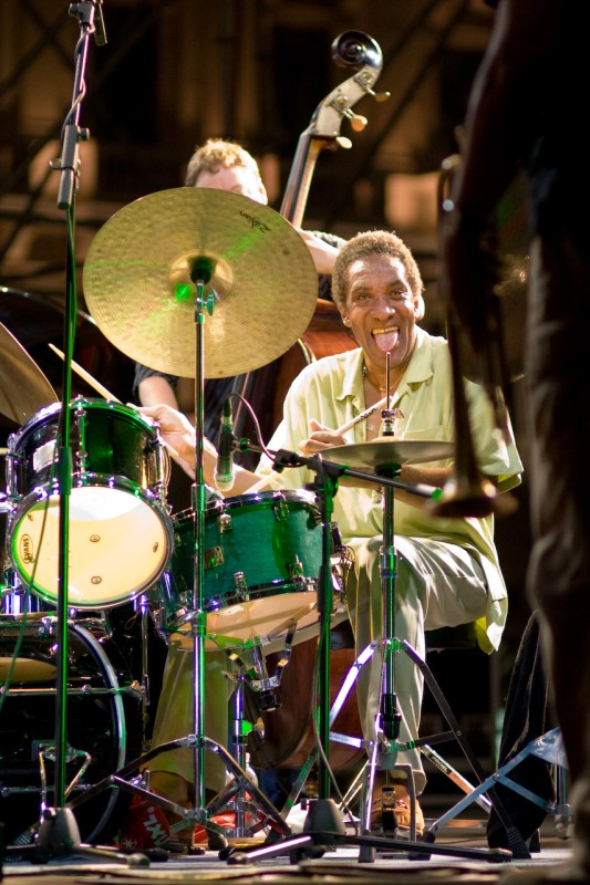 Al Foster Quintet @ Trieste, 2007